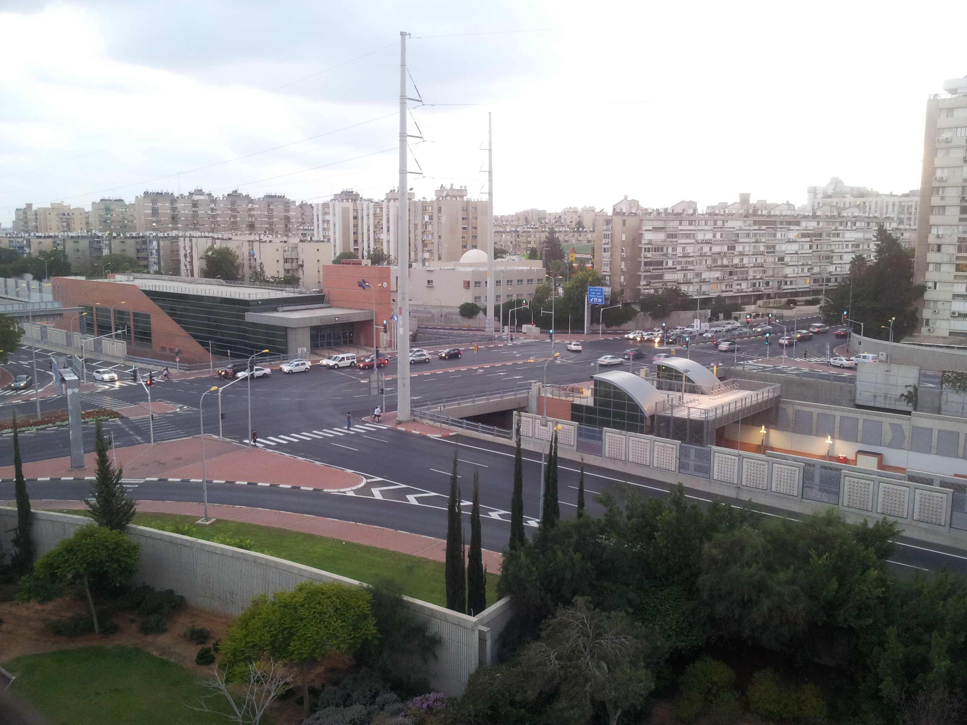 תחנת הרכבת בת-ים יוספטל. צילום מכיוון שכונת נאות רחל בחולון. ברקע - שכונת רמת הנשיא בבת-ים.